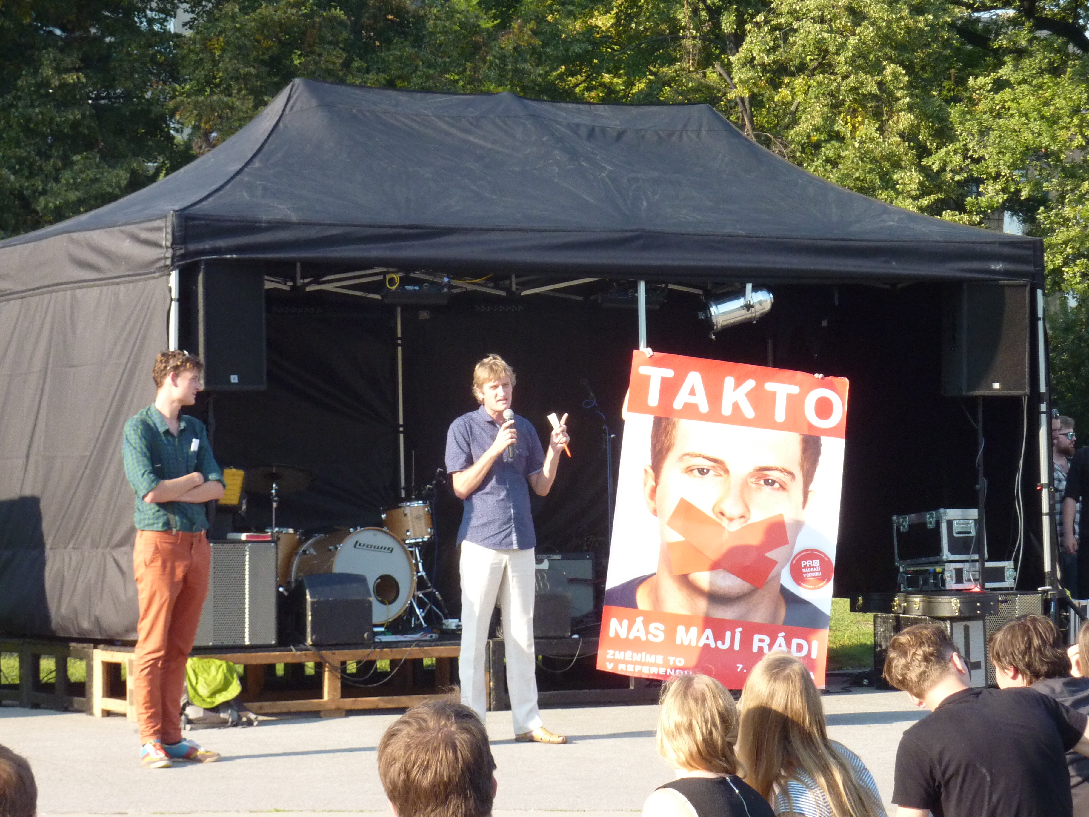 Den pro nádraží v centru 7. 9. 2016 16:00–22:00 Moravské náměstí, Brno. Uspořádala občanská aliance Referendum 2016. Na fotografii Josef Patočka představuje plakátovou kampaň.